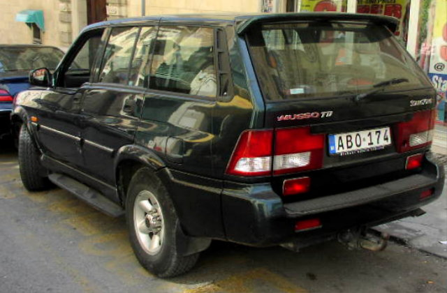 Ssangyong Musso